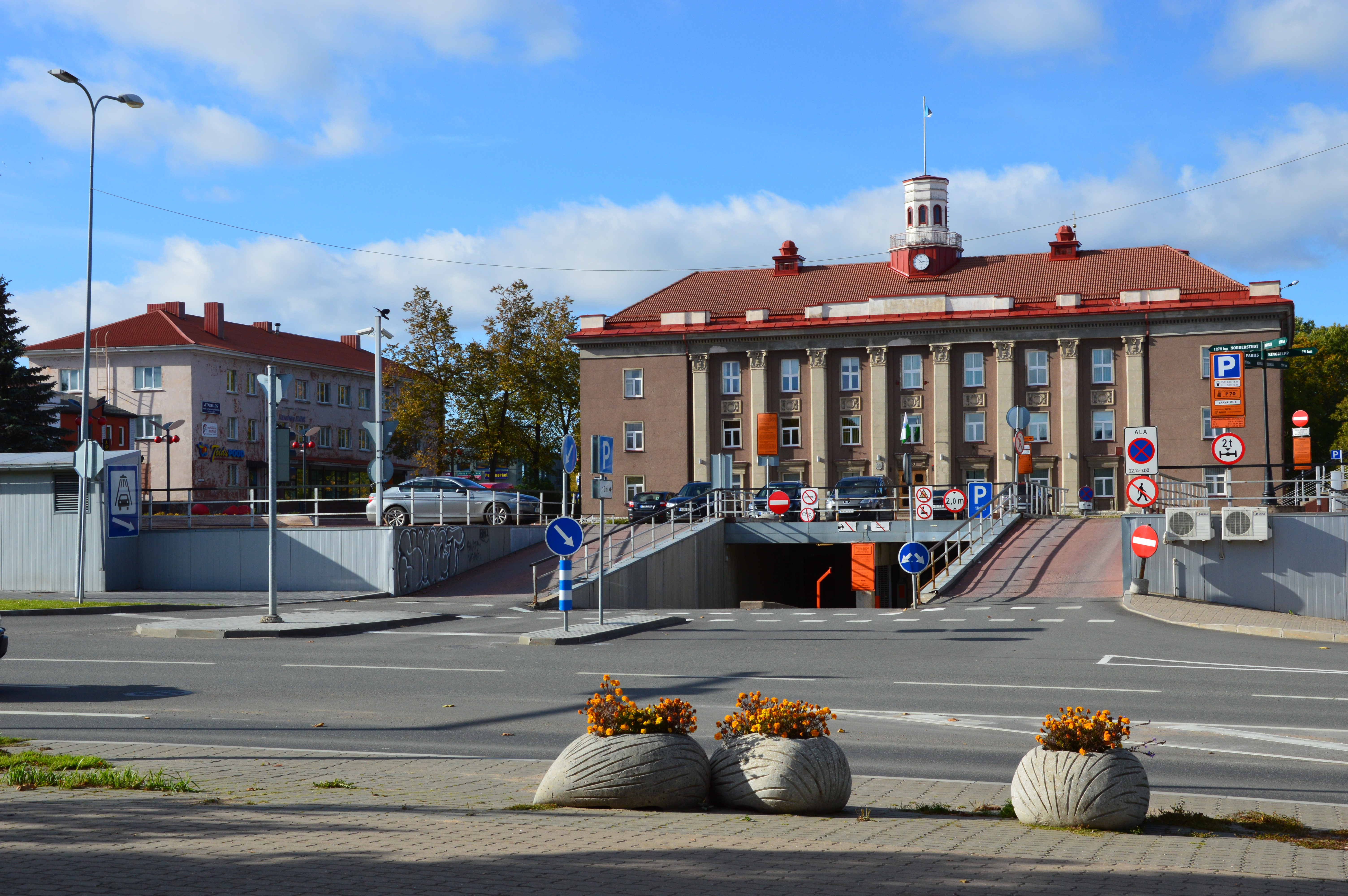 Administratiivhoone Jõhvis